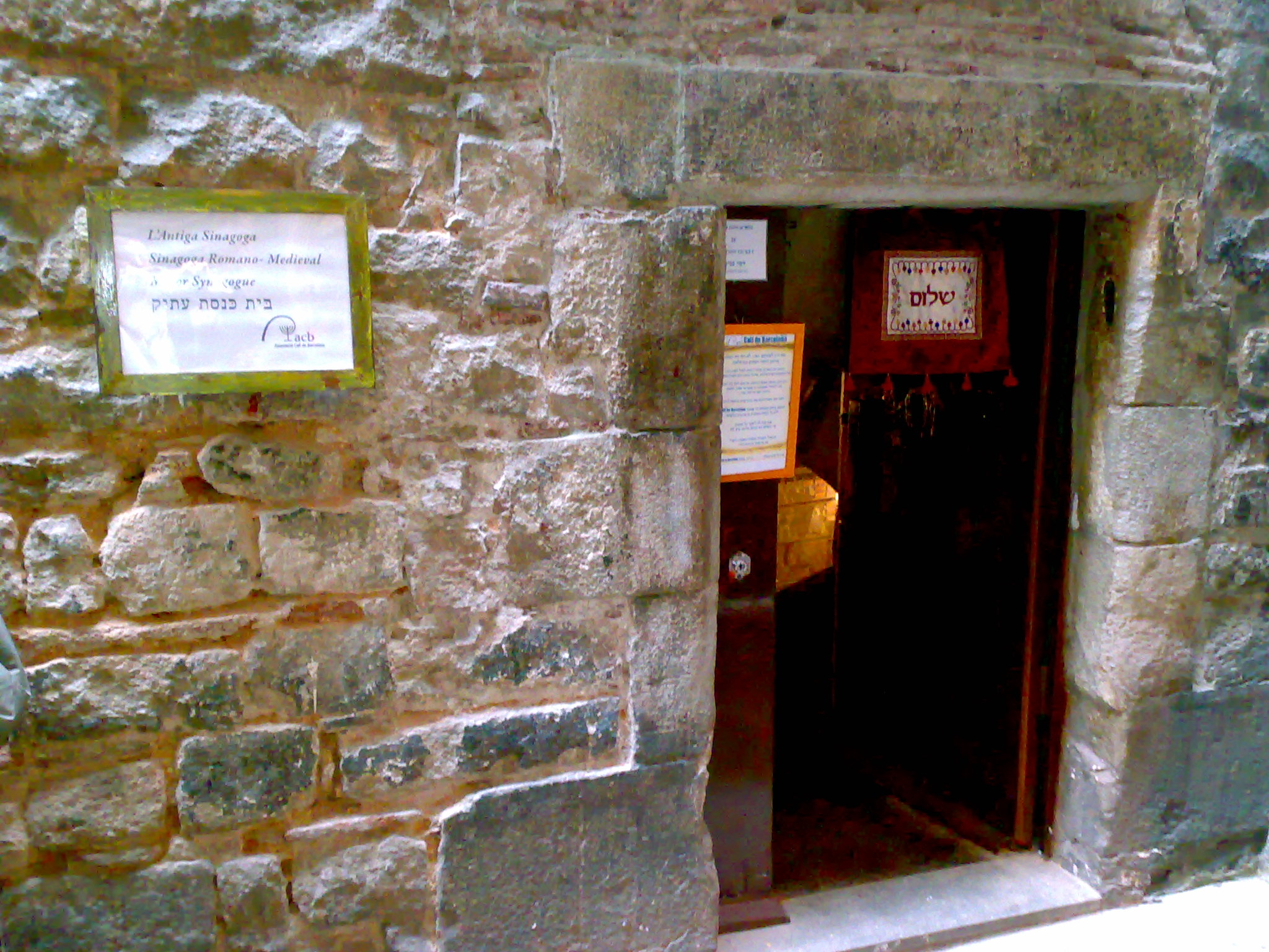 Entrada de la Associació Call de Barcelona (donde funcionan la sinagoga y la asociación).